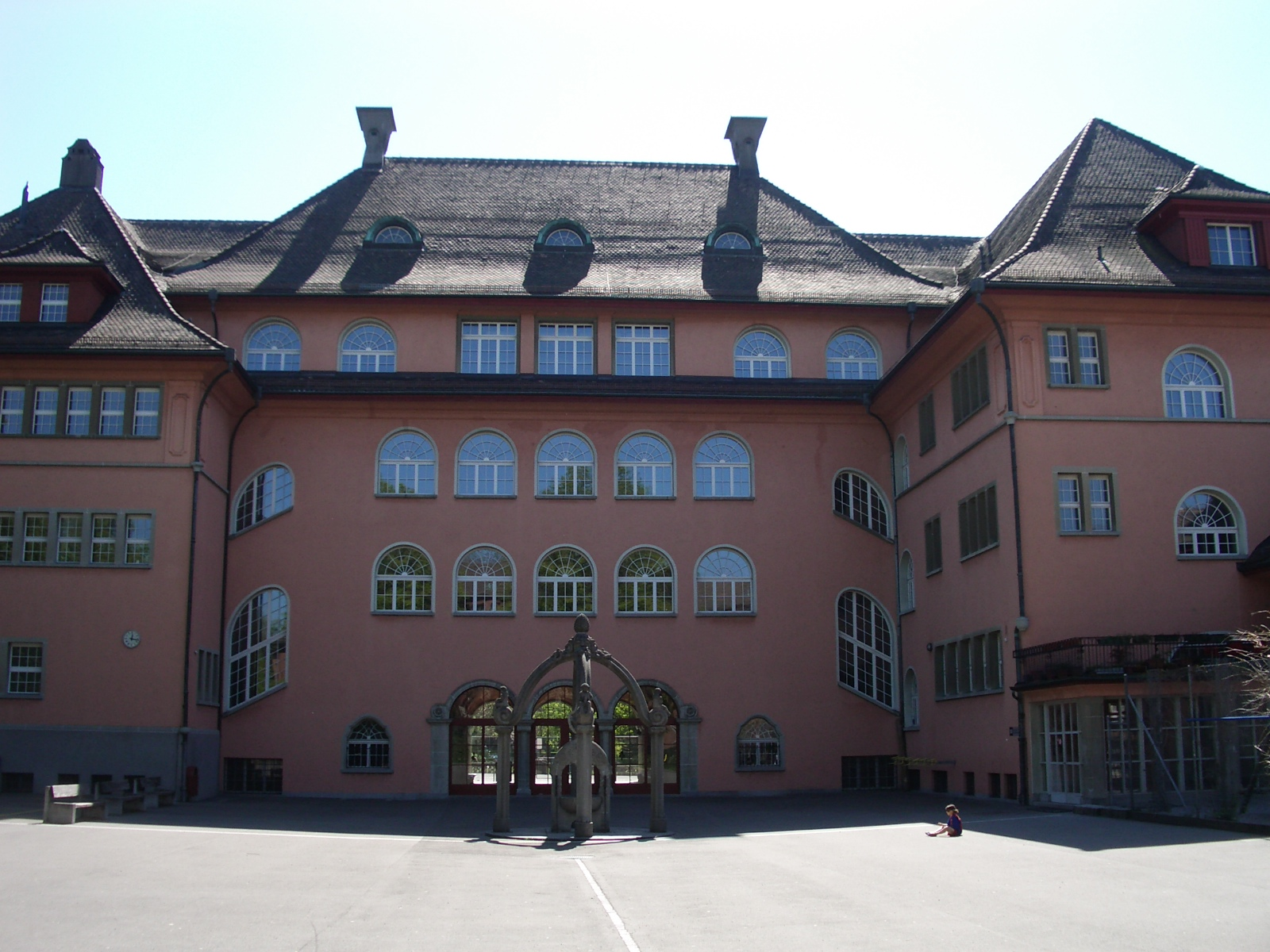 Zurich, Switzerland self-made, April 2007